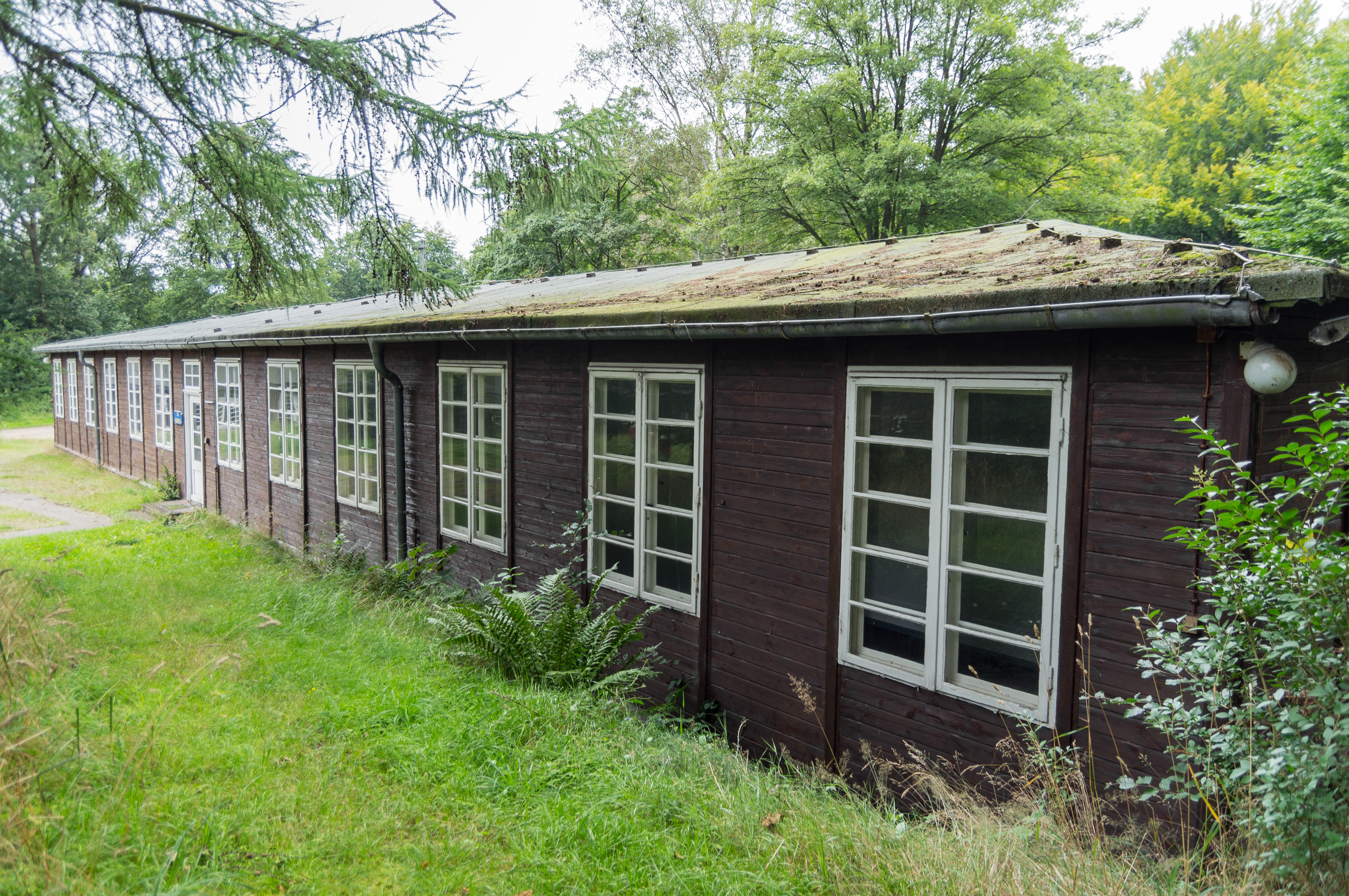 Flensburg-Mürwik; Kelmstrasse 14; Trampedachlager; Denkmal-Nr. 9.15